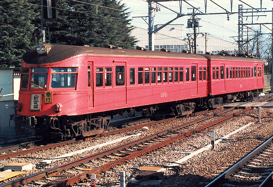 名古屋鉄道 850系 なまず